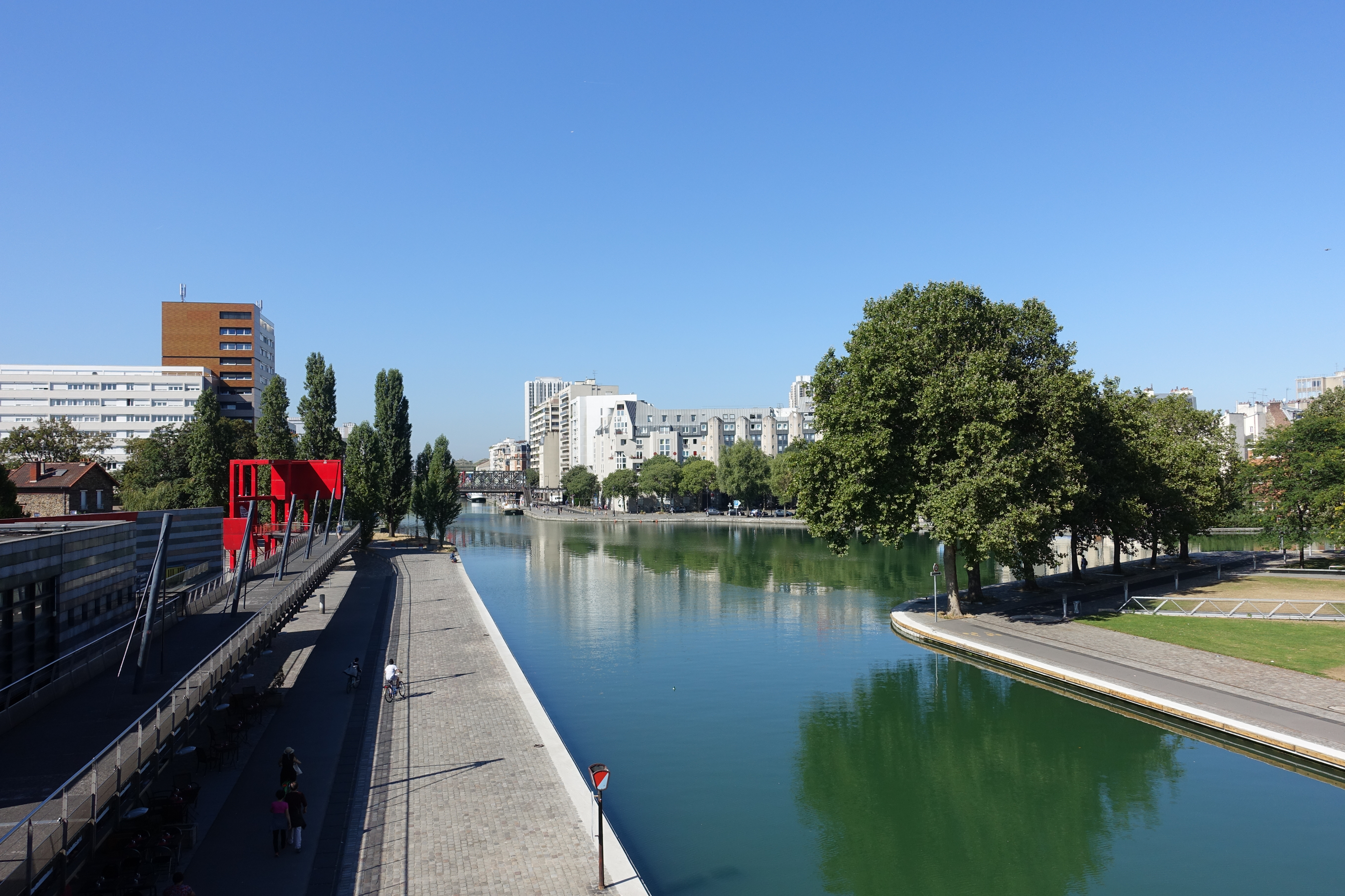 Parc de La Villette @ Paris